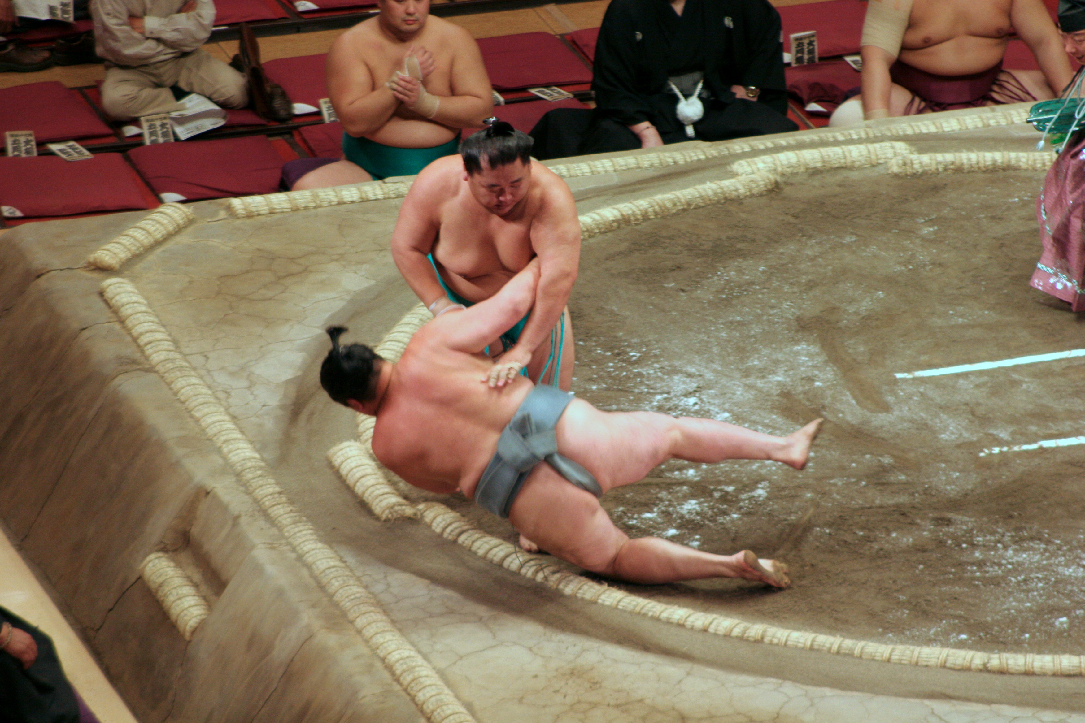 japon, tokyo, la fin d'un combat sumo